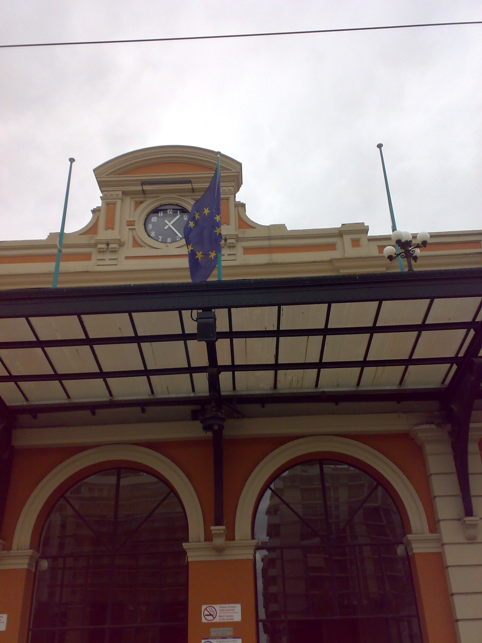 Particolare della Stazione di Bari